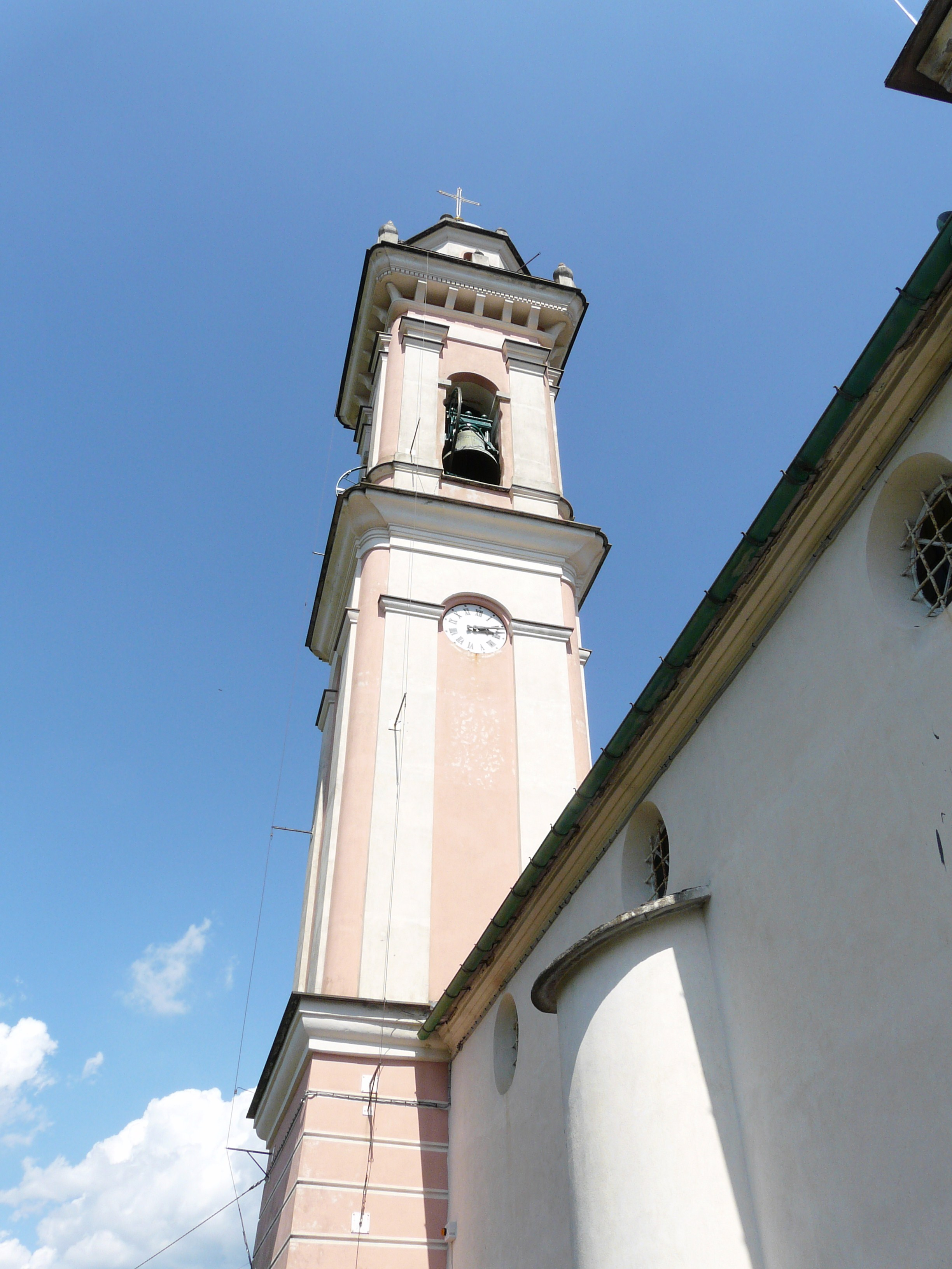 Campanile della Chiesa di San Pietro, San Pietro di Sturla, Carasco, Liguria, Italia